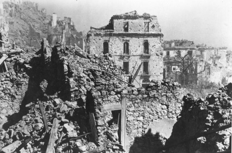 ADN-ZB/Archiv, II. Weltkrieg 1939-1945 In der Front in Italien, Frühjahr 1944 Blick auf einen Teil der zerstörten Stadt Cassino: Um die Stadt und besonders um das Kloster Monte Cassino wurde im Februar und März 1944 erbittert gekämpft. In einer neuen alliierten Offensive, die am 22. Mai begann, wurde die deutsche Front durchbrochen. (Enz)